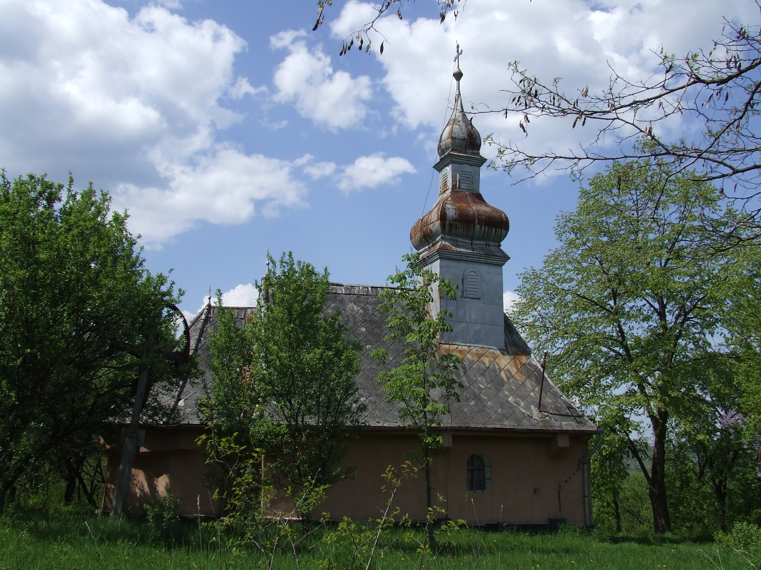 Biserica de lemn din Lelei, judeţul Satu Mare.